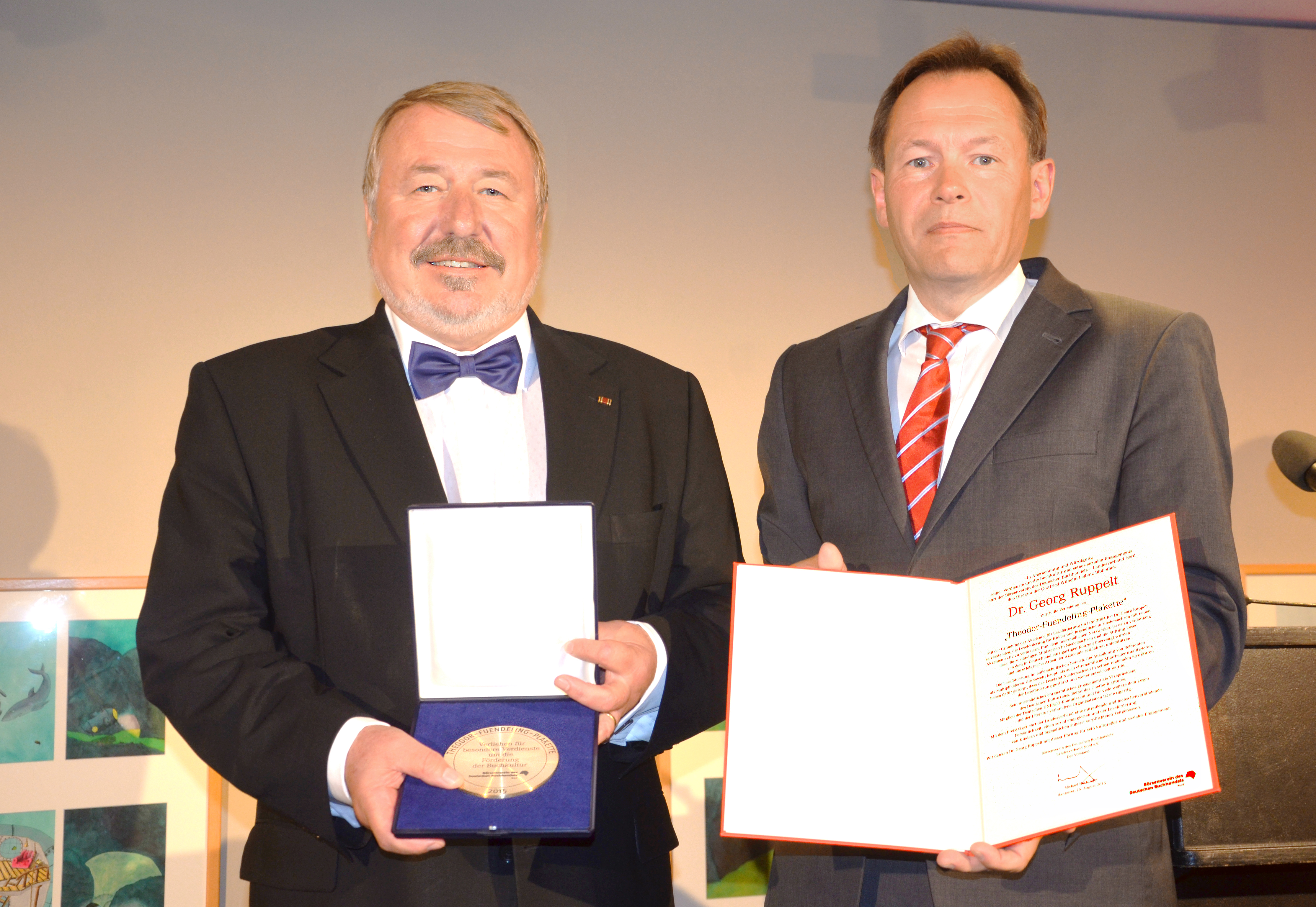 Der Direktor der Gottfried Wilhelm Leibniz Bibliothek – Niedersächsische Landesbibliothek, Dr. Georg Ruppelt (links), mit der Theodor-Fuendeling-Plakette in den Händen, hier mit Michael Hechinger, Vorstandsvorsitzender des Börsenvereins des Deutschen Buchhandels Nord und die durch ihn verliehenen Urkunde ...